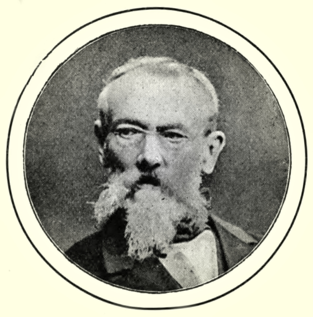 Fotografie Theodor Schloepke um 1875